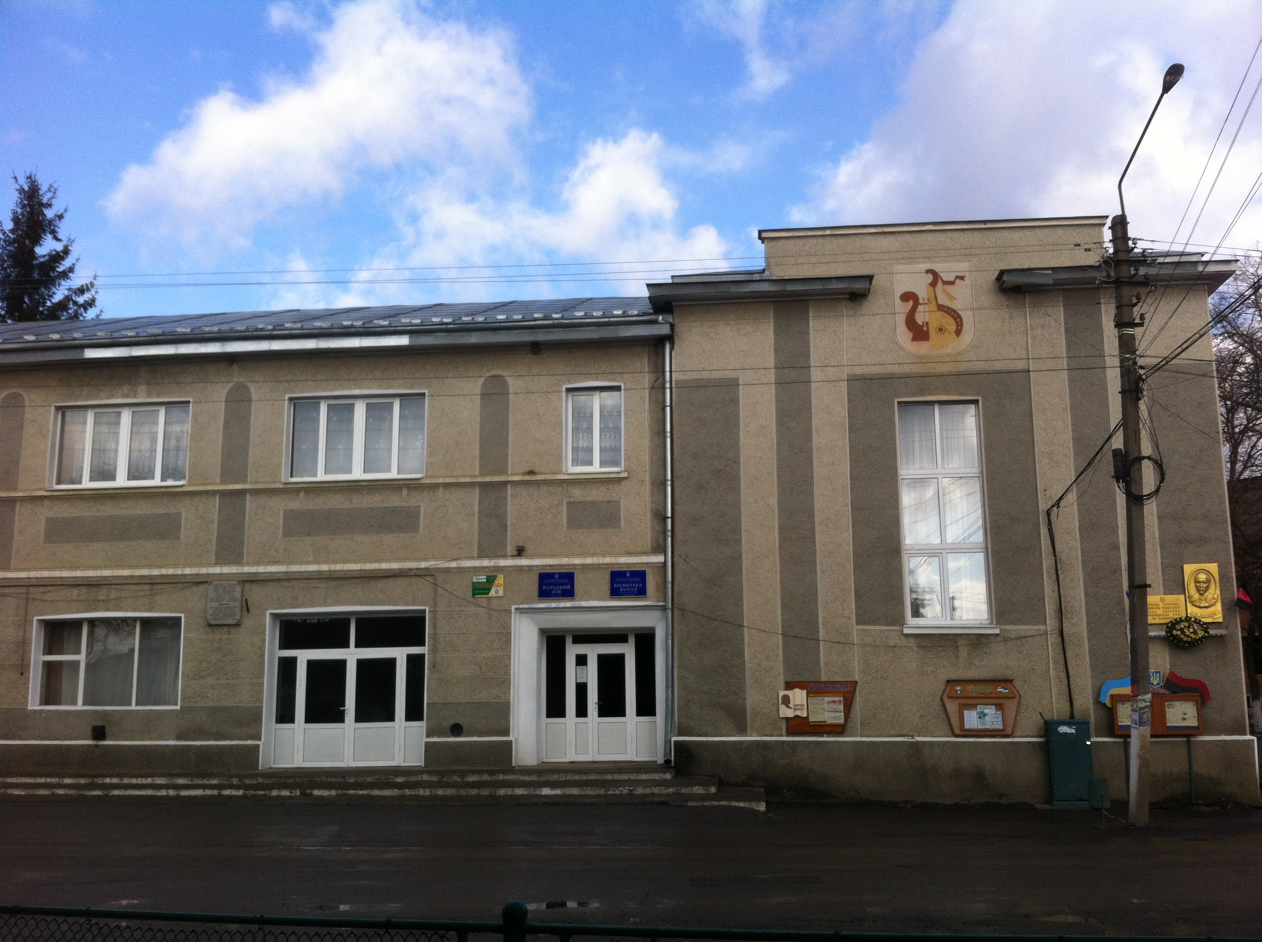 Народний дім